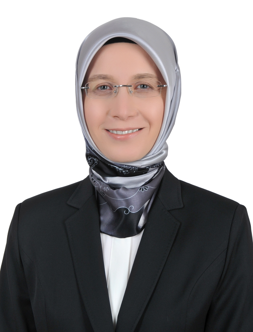 Ak Parti Balıkesir Milletvekili